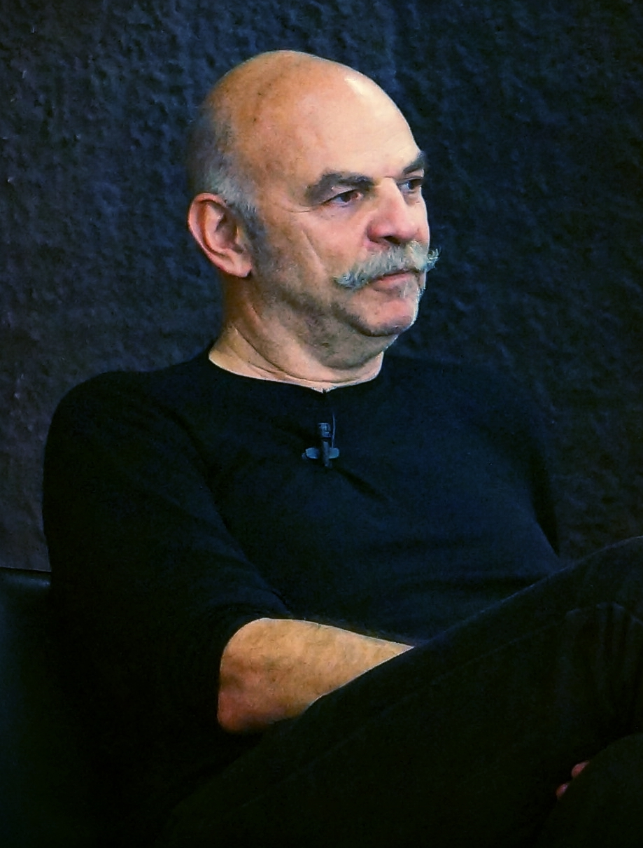 El periodista argentino Martín Caparrós.